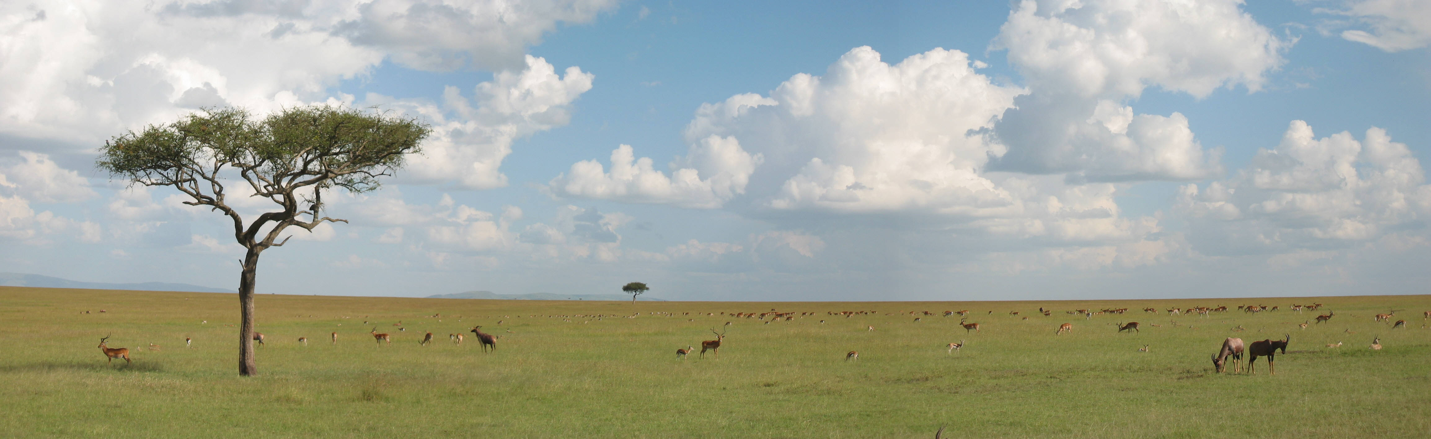 Savanne in de Maasai Mara, Kenya